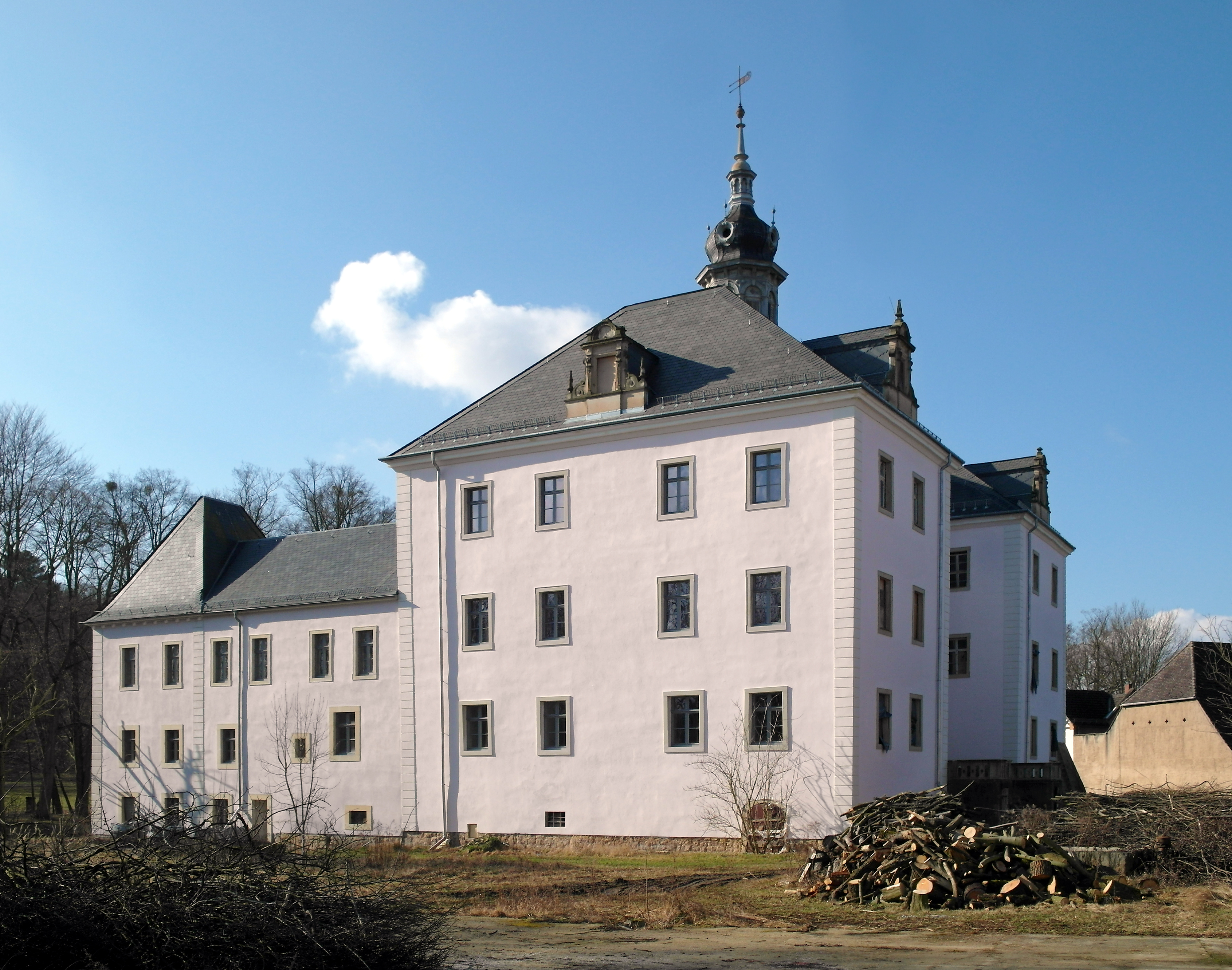 13.02.2018 01833 Dittersbach (Dürrröhrsdorf-Dittersbach): Schloß Dittersbach, Hauptstraße 113 (GMP: 51.035504,13.988688): Drei-Flügel-Anlage, 1555 bis 1563 für den sächsischen Kanzler Dr. Hieronymus Kiesewetter errichtet. 1829 kaufte Johann Gottlob von Quandt Rittergut und Schloß und gab ihm 1830 sein heutiges Aussehen. Seit 1925 war das Schloß als Erholungsheim im Besitz der Stadt Dresden. In der DDR-Zeit wurde es von einer Landwirtschaftlichen Produktionsgenossenschaft (LPG) genutzt. 2004 verkaufte die Stadt Dresden den Gebäudekomplex mit dem Park an die Heinrich & Müller GmbH aus Stuttgart, die das Anwesen schrittweise saniert. Sicht von Nordosten. [SAM3872.JPG]20180313115DR.JPG(c)Blobelt